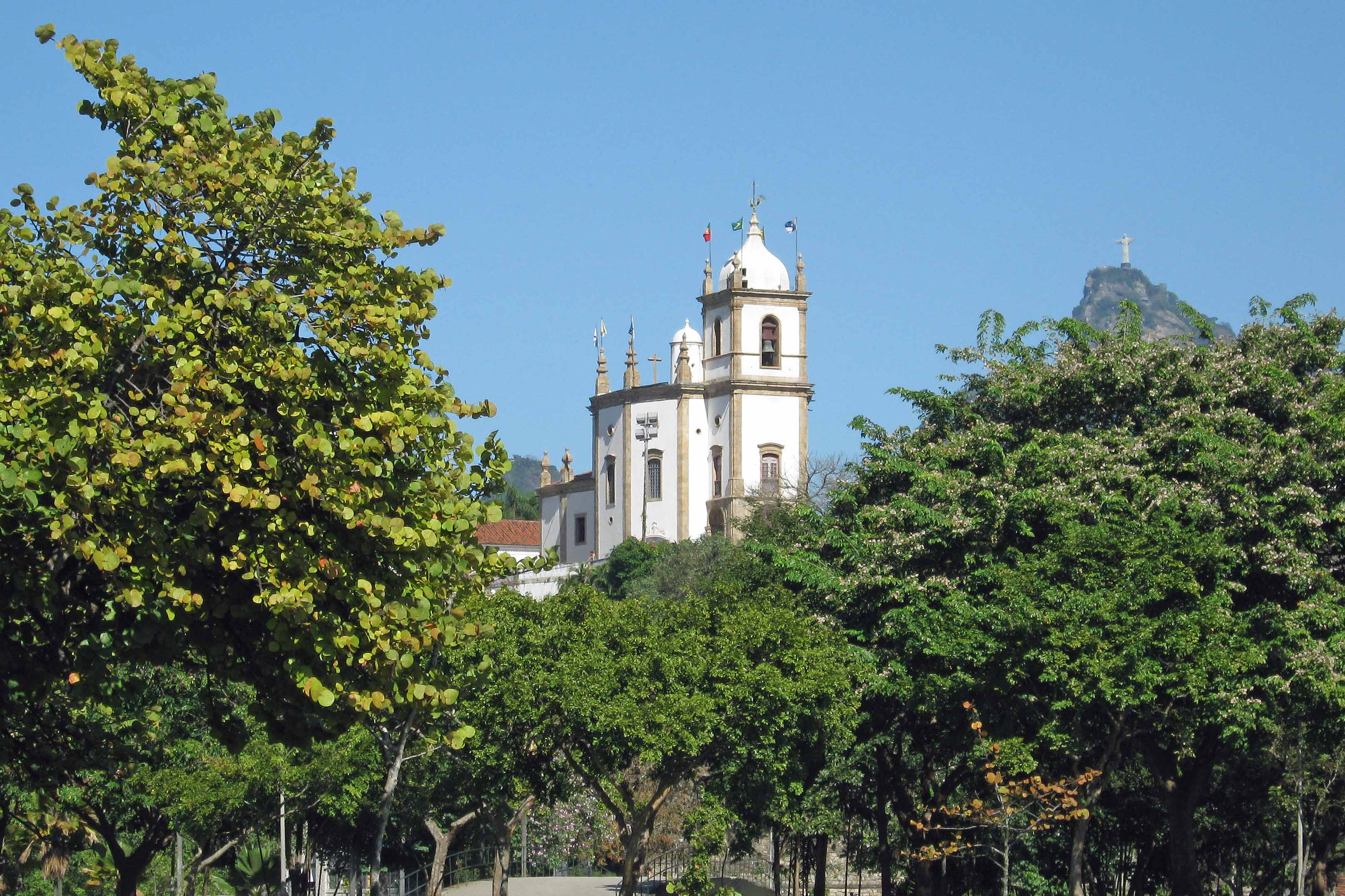 Igreja de Nossa Senhora da Glória do Outeiro vista do Aterro da Glória com a estátua do Cristo Redentor no Corcovado ao fundo